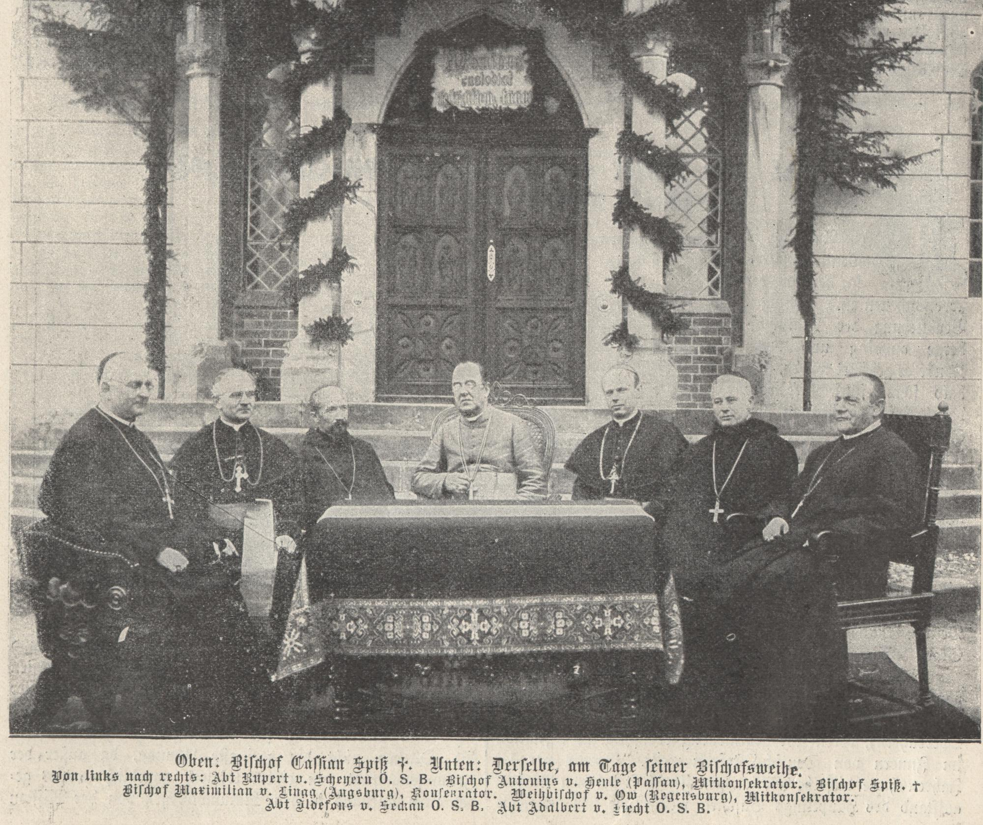 Cassian Spiß am Tage seiner Bischofsweihe